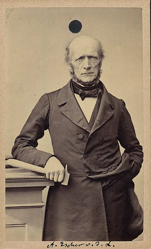 Swiss geologist Arnold Escher von der Linth (1807 - 1872)